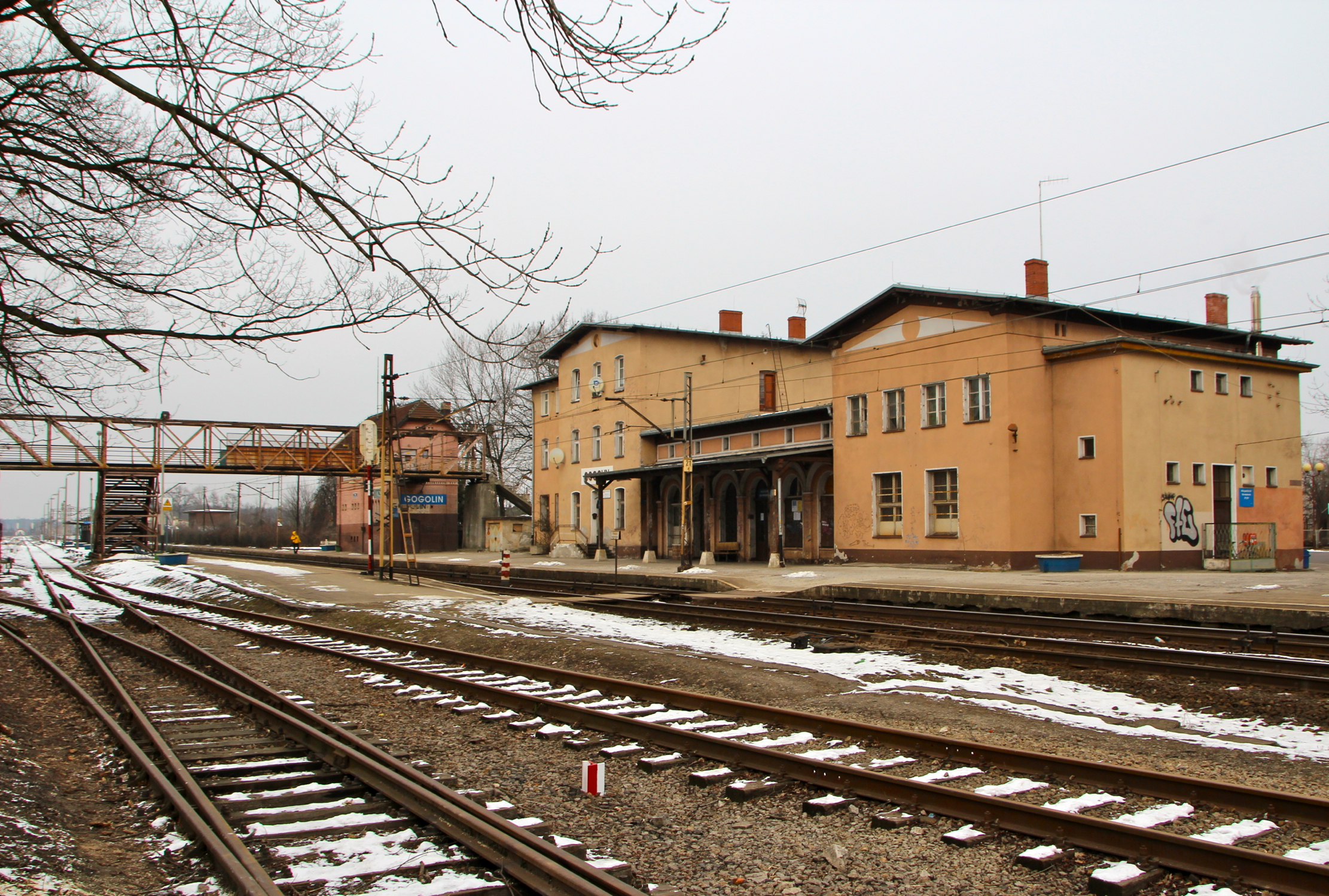 Budova nádraží v Gogolině, Polsko. V popředí nástupiště